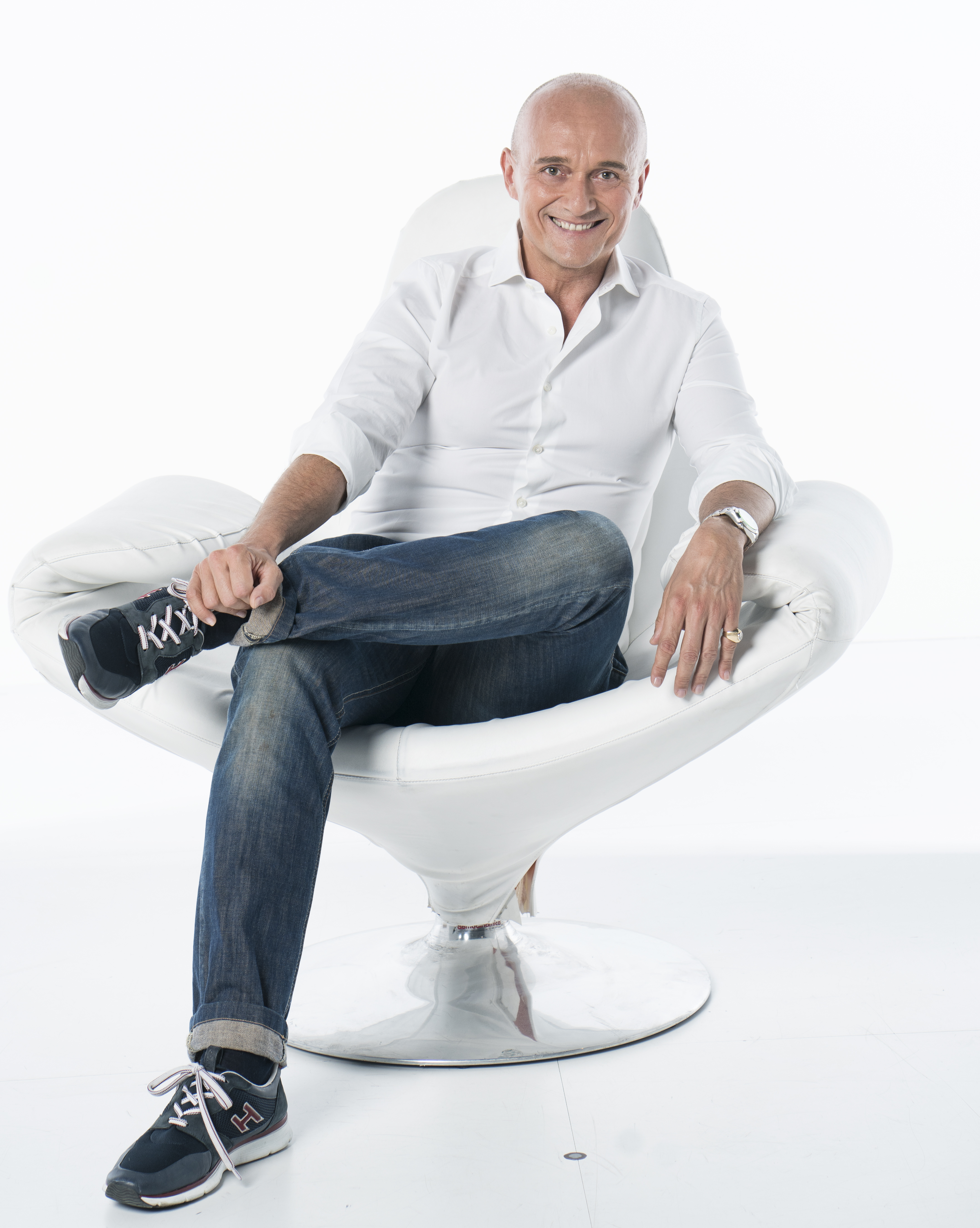 Alfonso Signorini, direttore della rivista Chi (Mondadori).